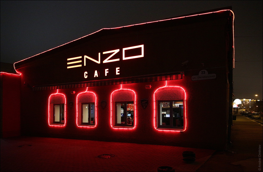 Мінск. Кастрычніцкая 23